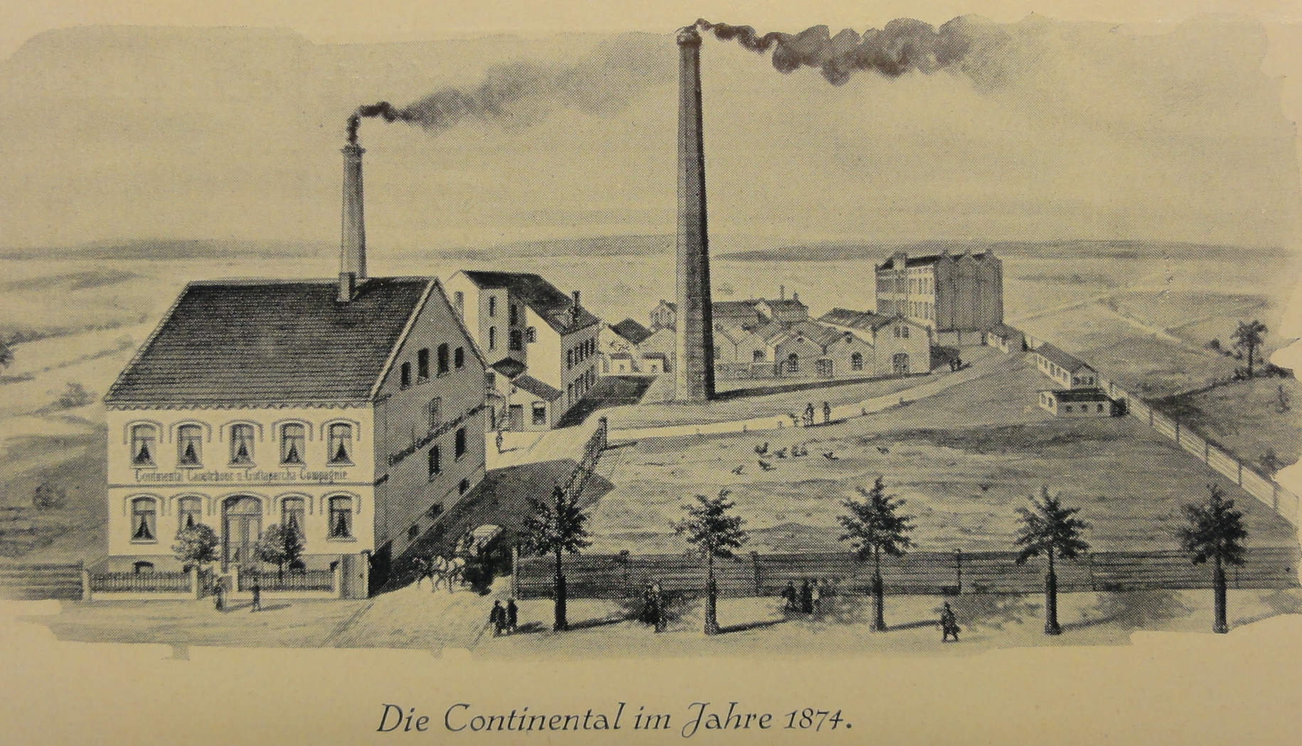 Ansicht des Gründungswerks der Continental Caoutchouc & Guttapercha Compagnie AG, der späteren Continental Gummiwerke AG Hannover